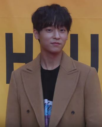 24일 오후 서울시 성동구 성수동 성수연방에서 곽현주 컬렉션(KWAK HYUN JOO COLLECTION) '2019 S/S 오프쇼'가 열렸다.